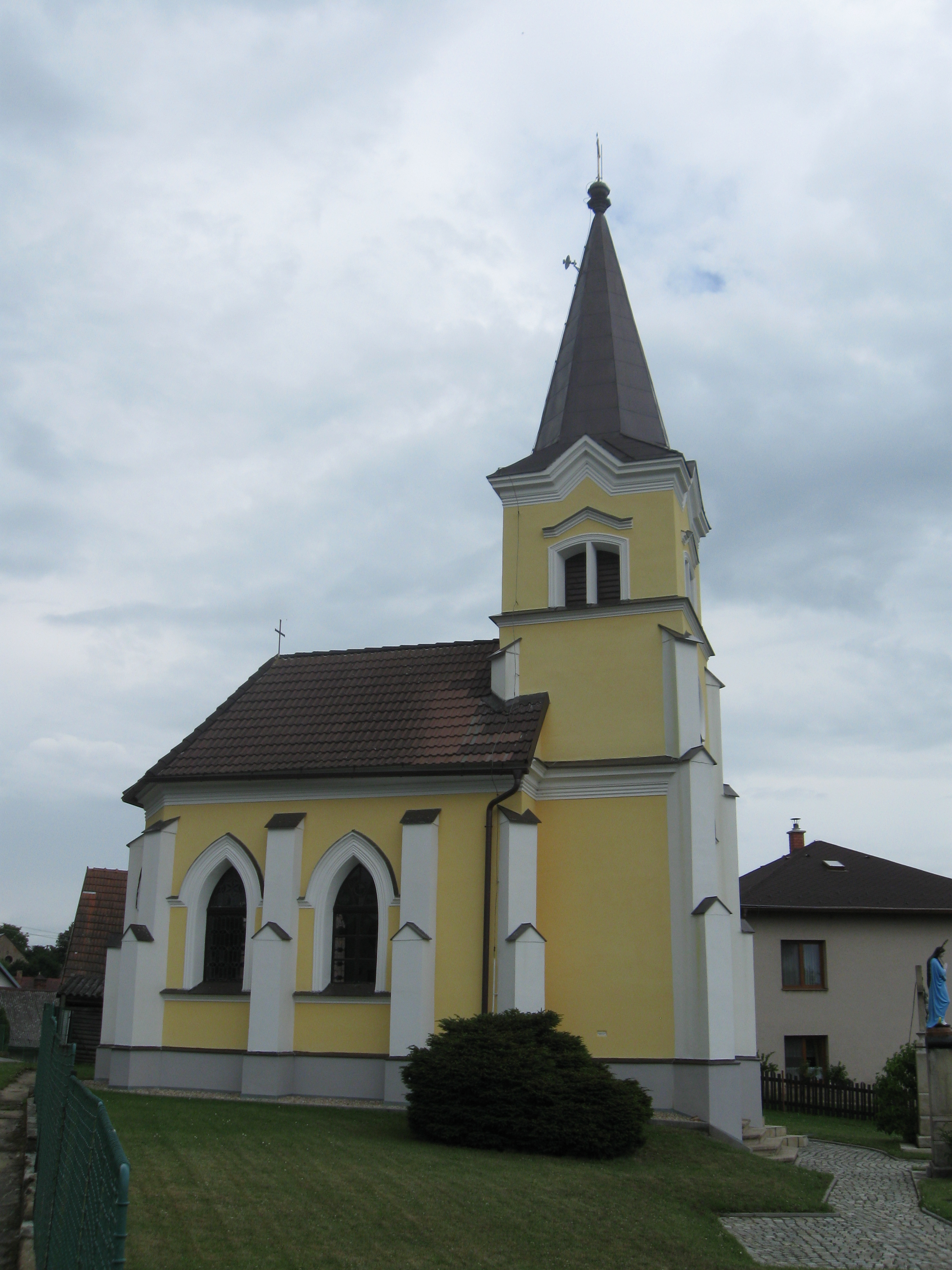 Křelovice, okres Pelhřimov. Pseudogotická kaple P. Marie z konce 19. století.